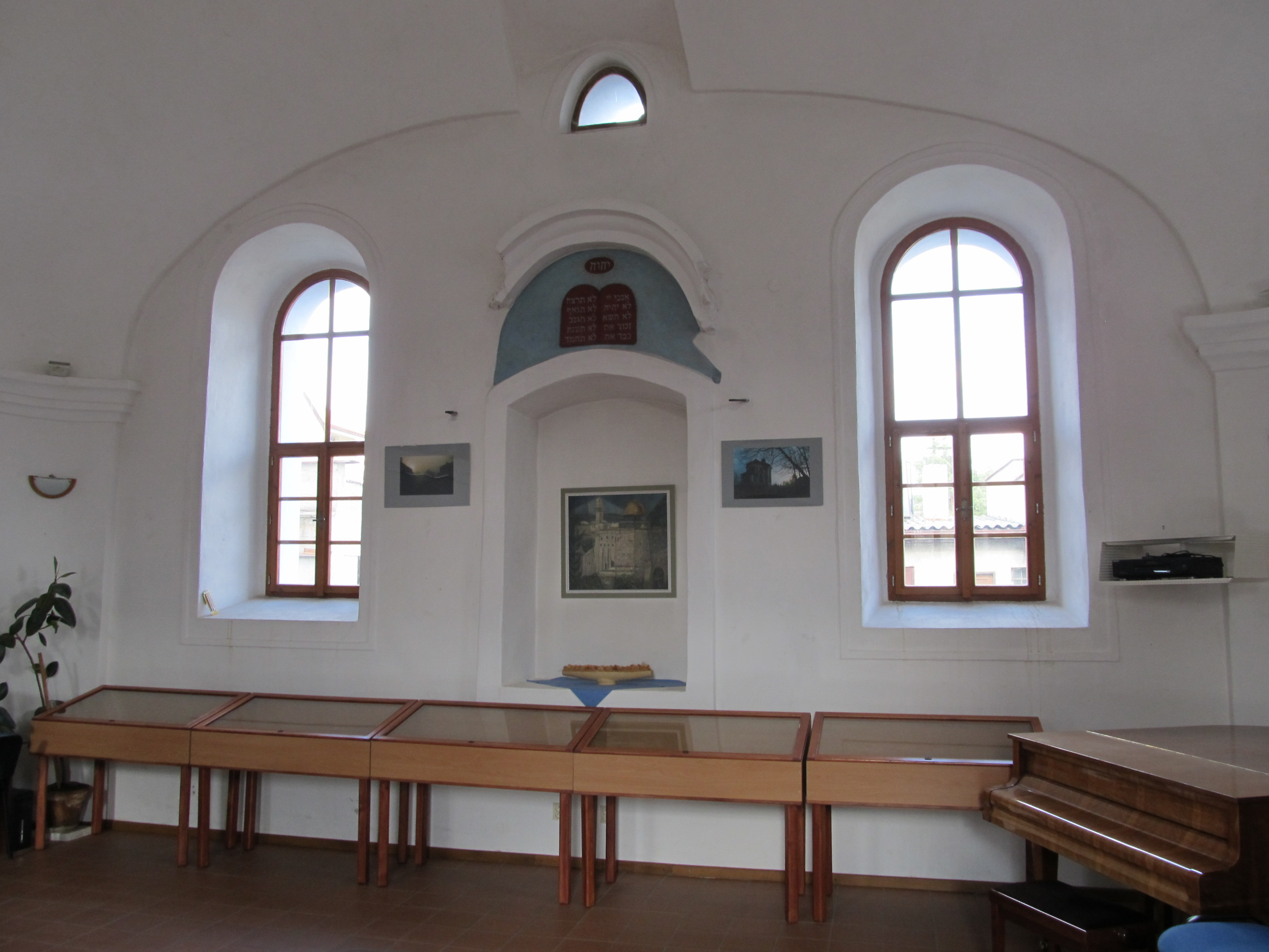 Radnice - vnitřek synagogy